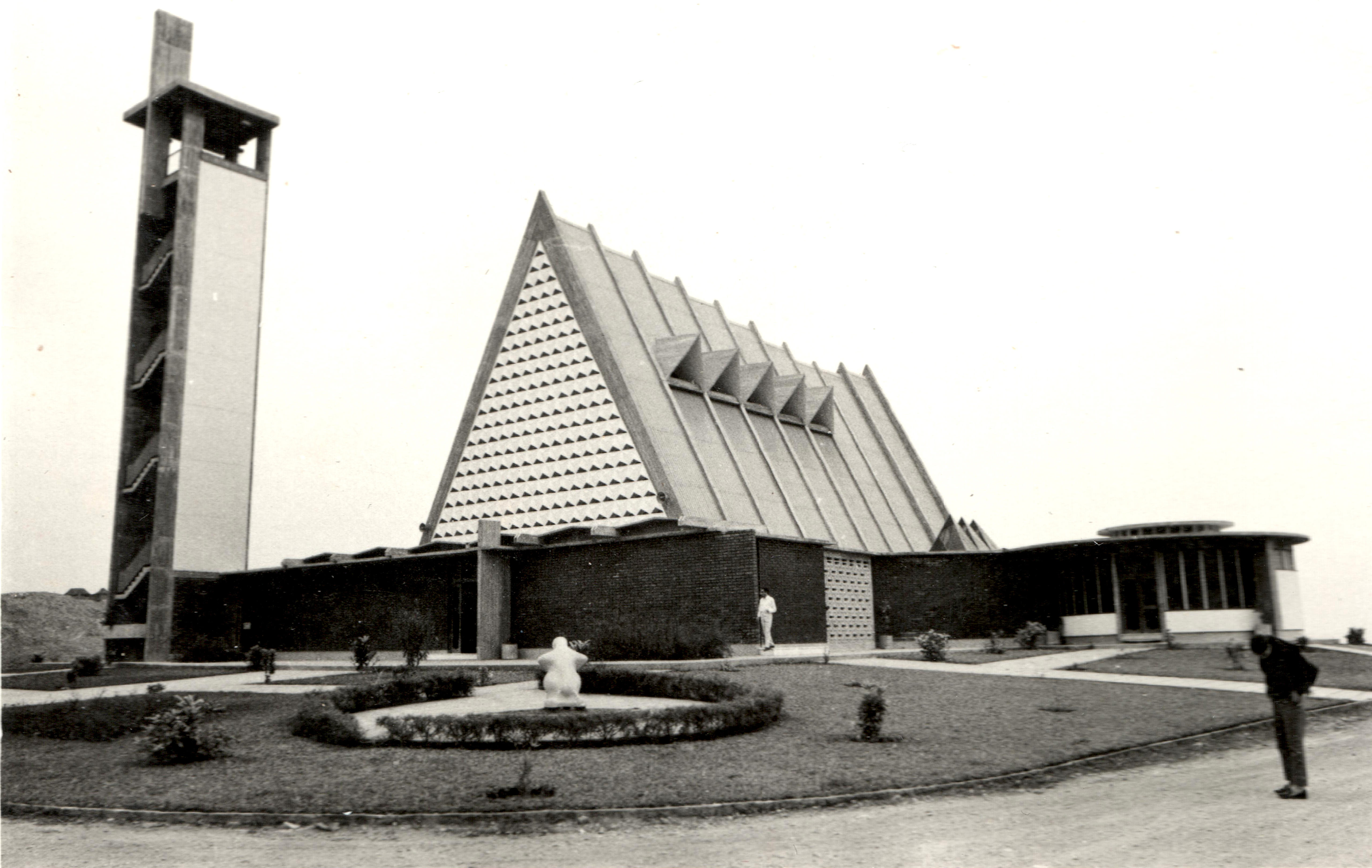 Igreja N. Sra. da Conceição, Novo Redondo (Sumbe), Angola. ca.1970.